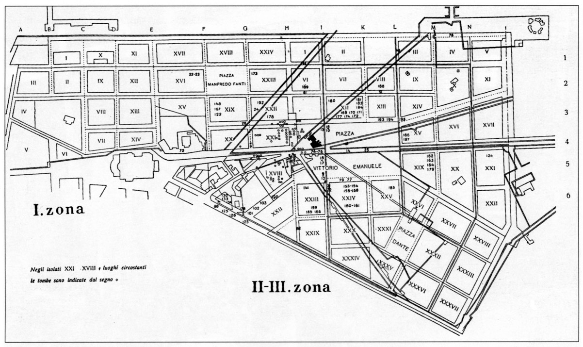 Planimetria dei ritrovamenti avvenuti nella necropoli